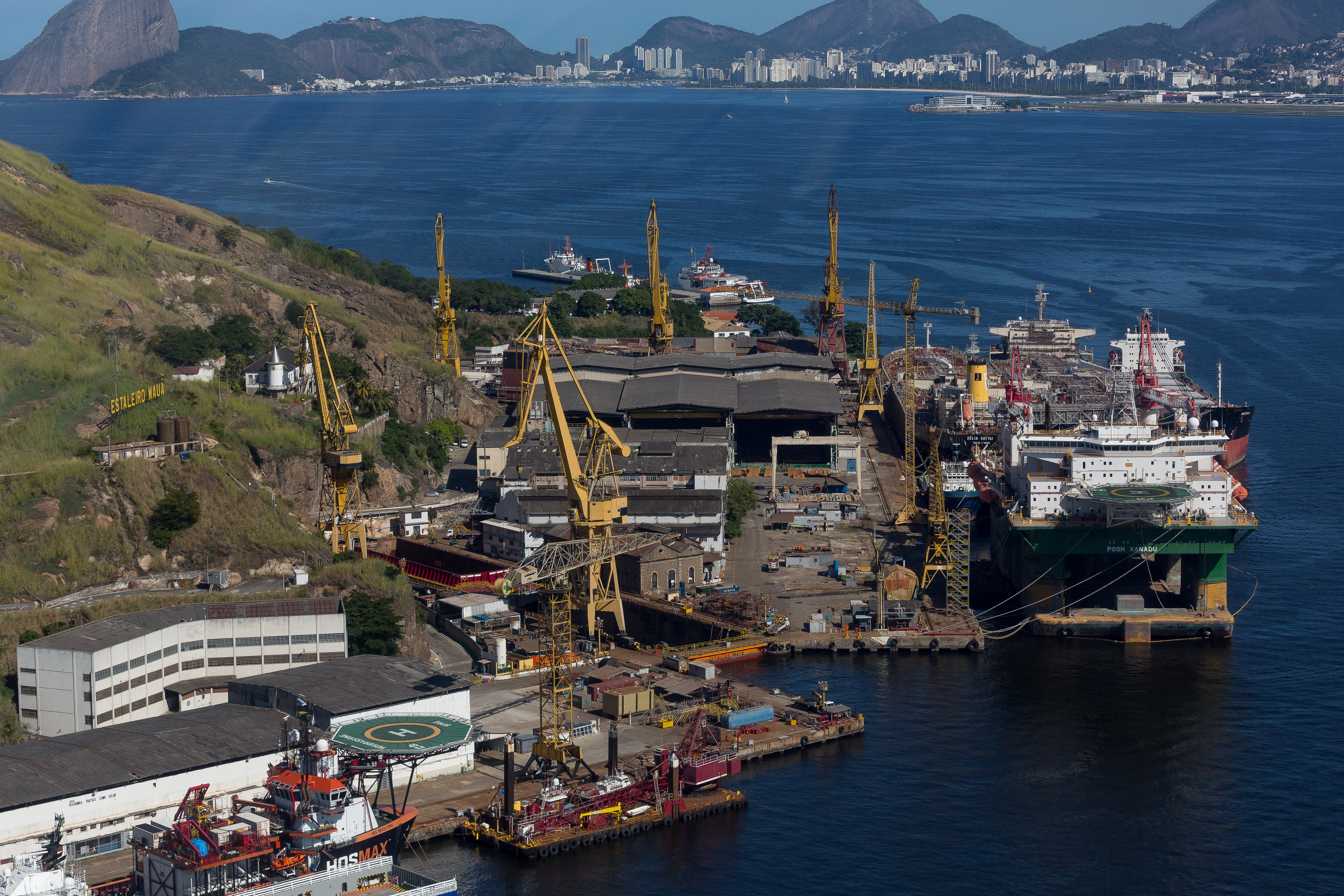 Vista aérea do Estaleiro Mauá localizado na cidade de Niterói, RJ - Brasil.